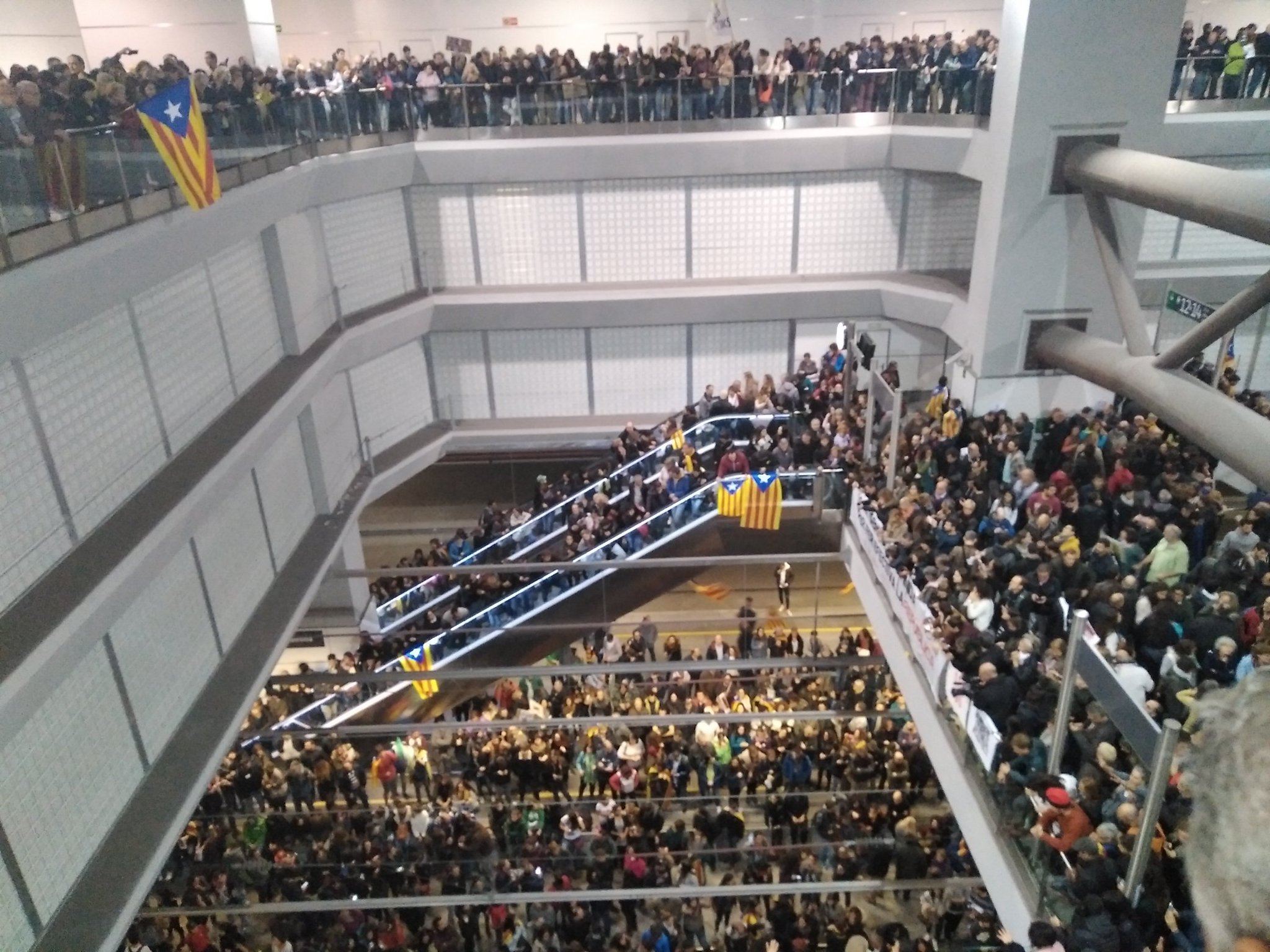 Estat de l'estació de l'AVE a Girona durant el vespre de la vaga general del 8N